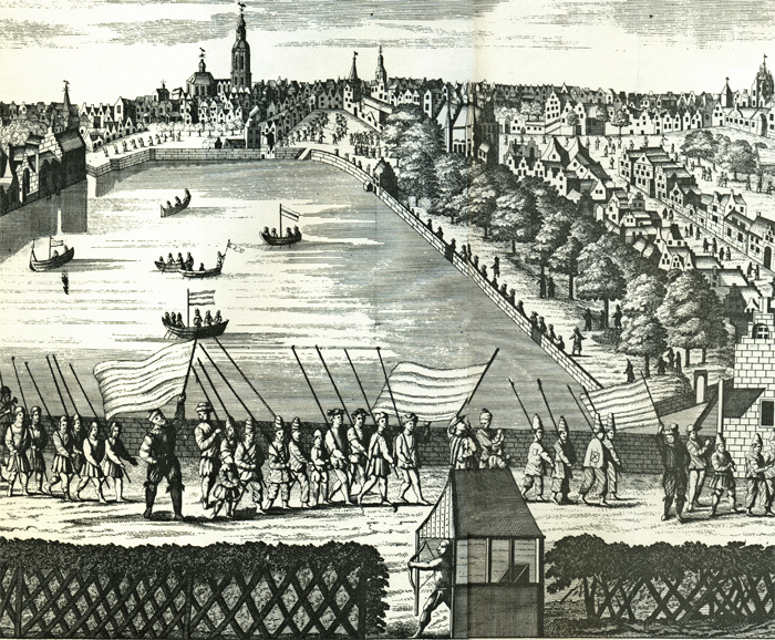 Hofvijver in Den Haag